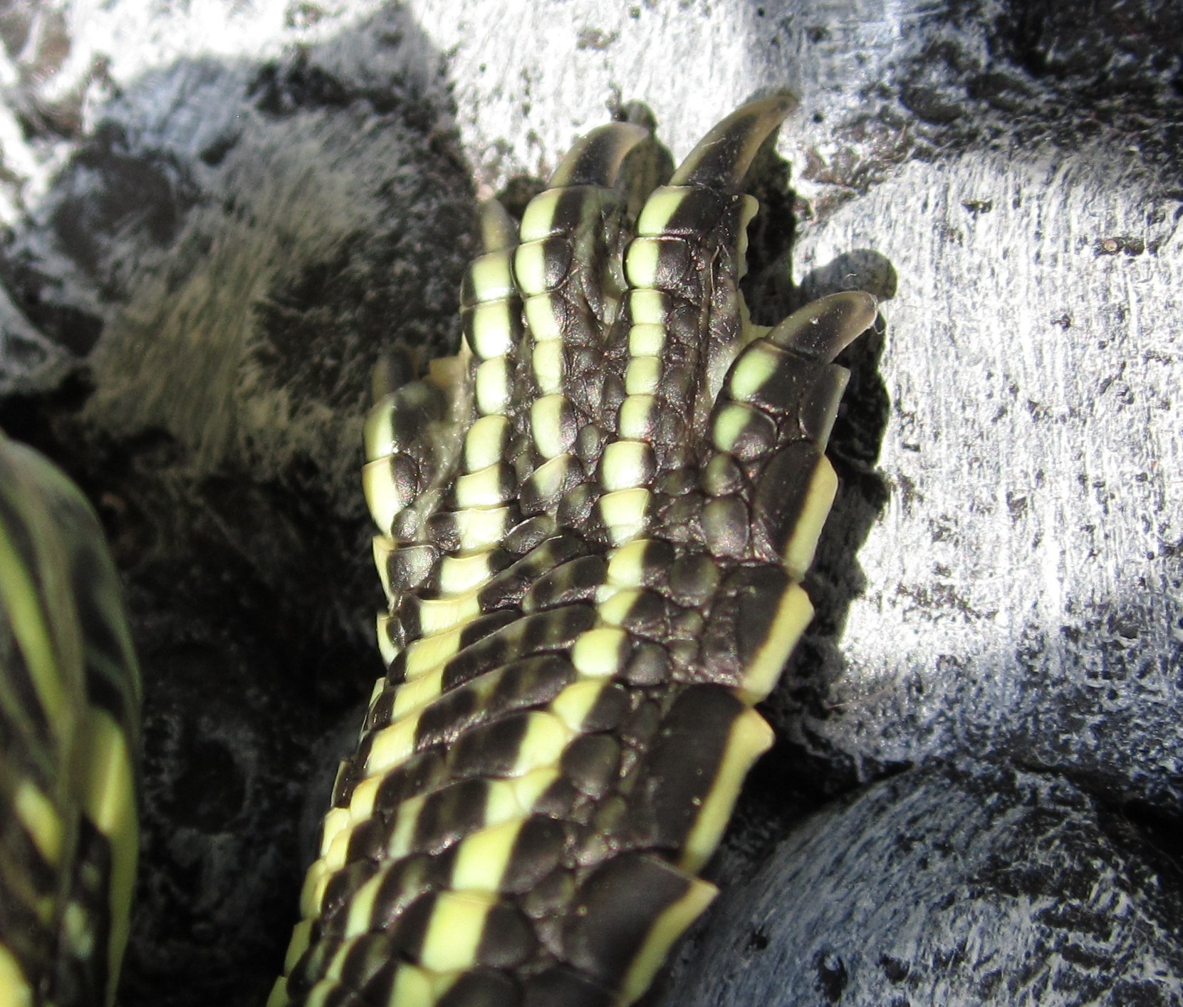 Donde se distinguen las garras.